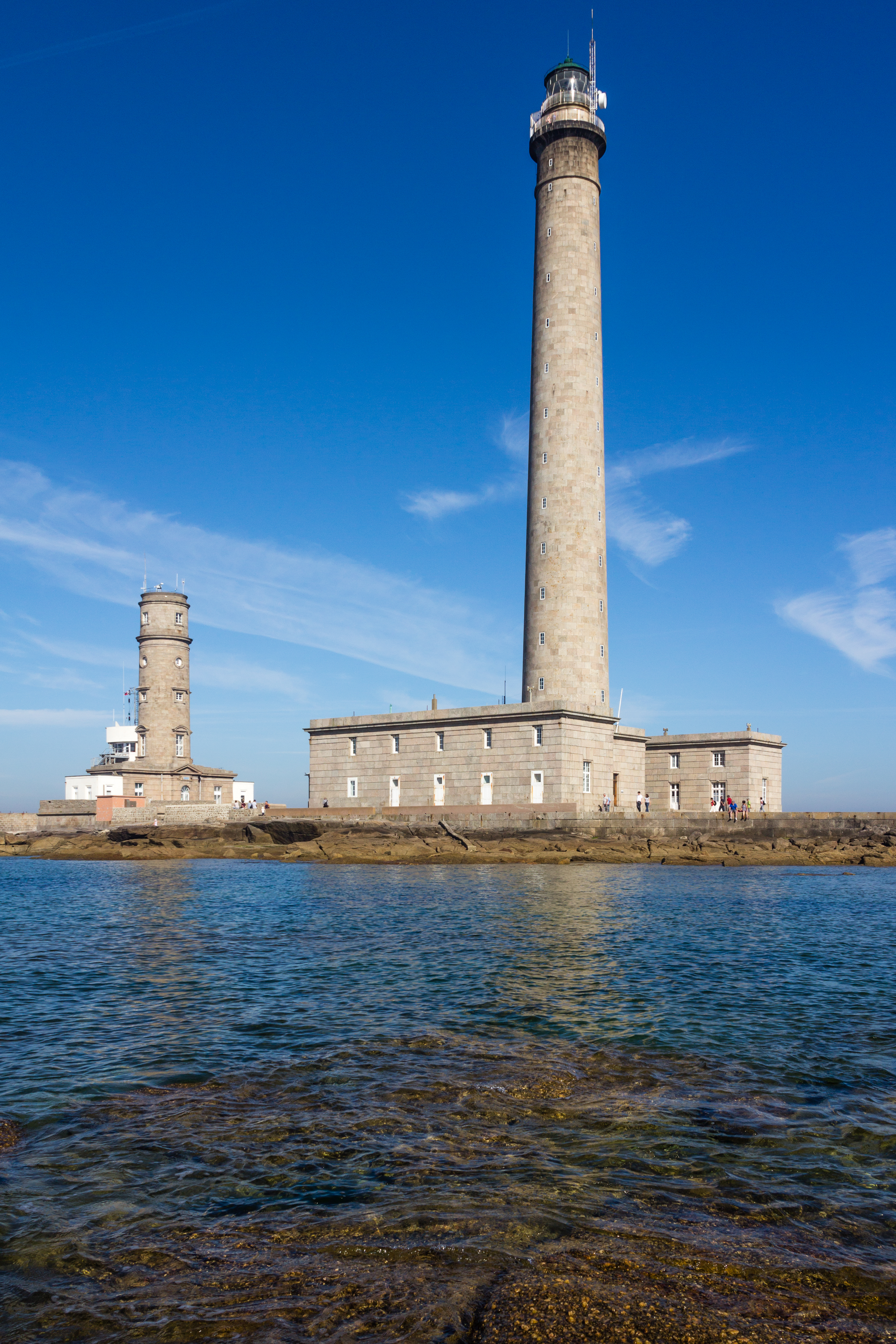 Phare de Gatteville-le-Phare (France) .